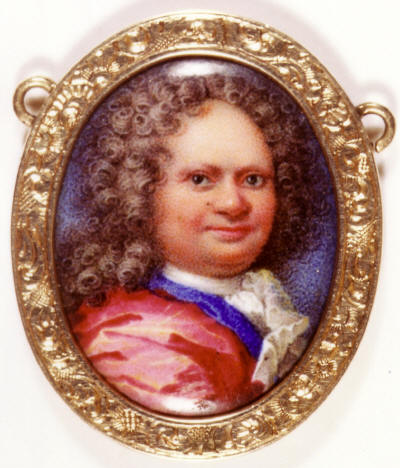 Selbstporträt